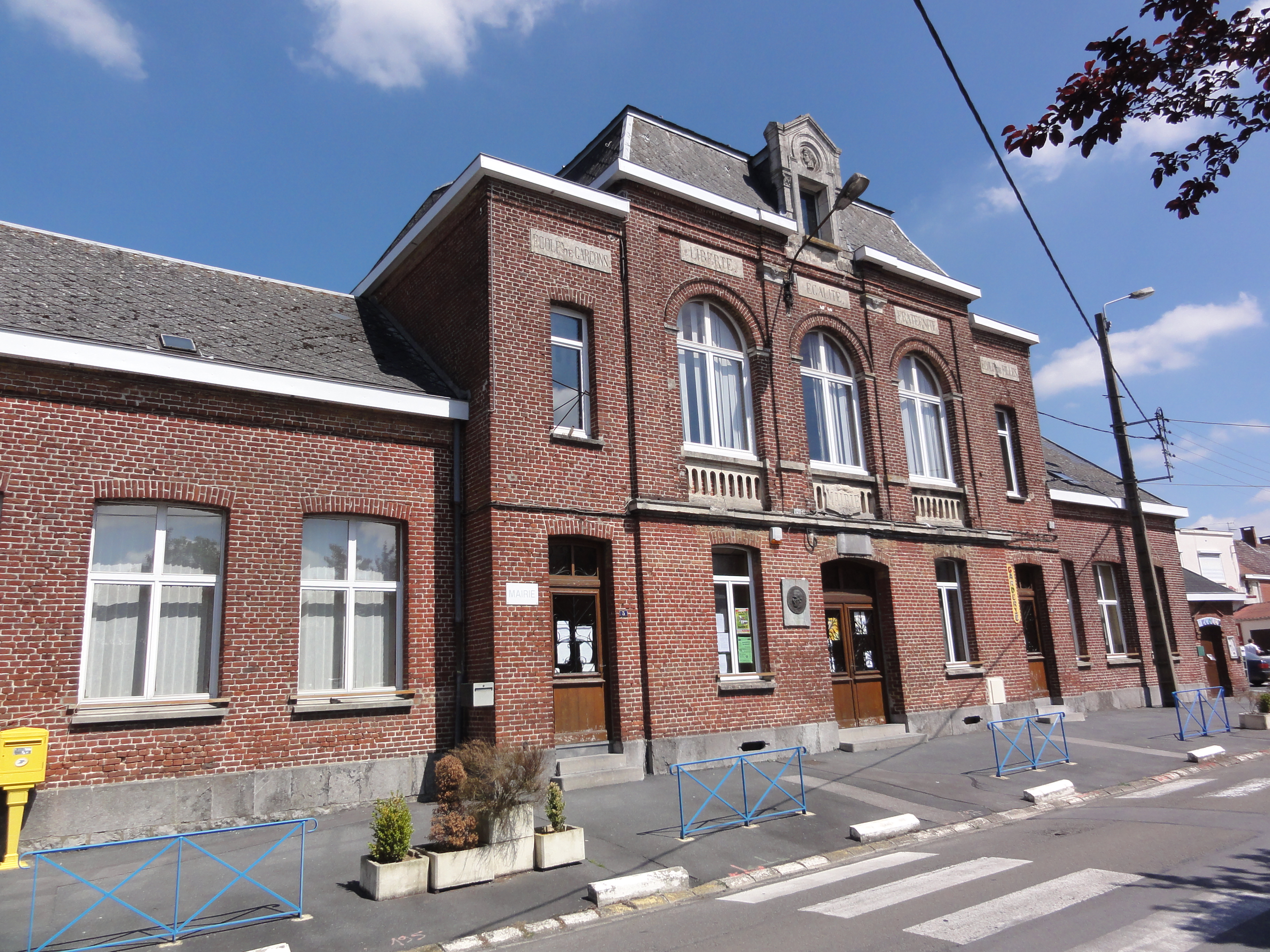 Gognies-Chaussée (Nord, Fr) mairie et écoles